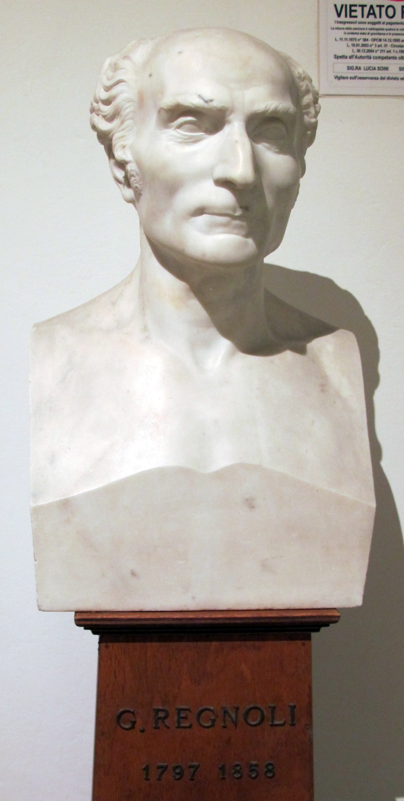 Istituto di anatomia patologica, museo, busto giorgio regnoli